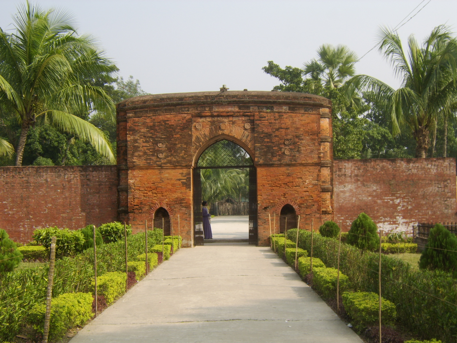 ষাট গম্বুজ মসজিদ প্রাঙ্গণে ঢোকার মূল ফটক।